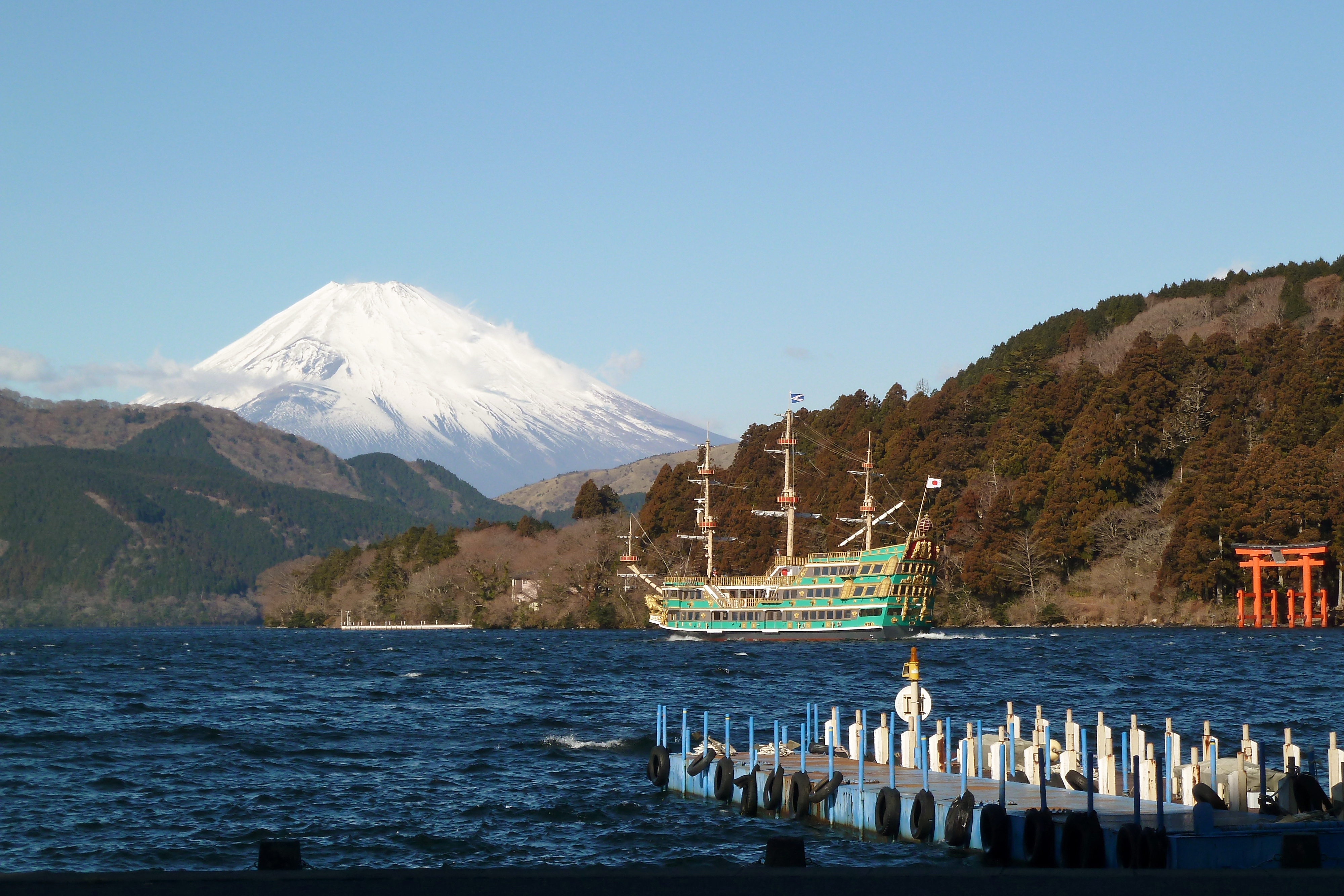 芦ノ湖畔から望む富士山（神奈川県箱根町）